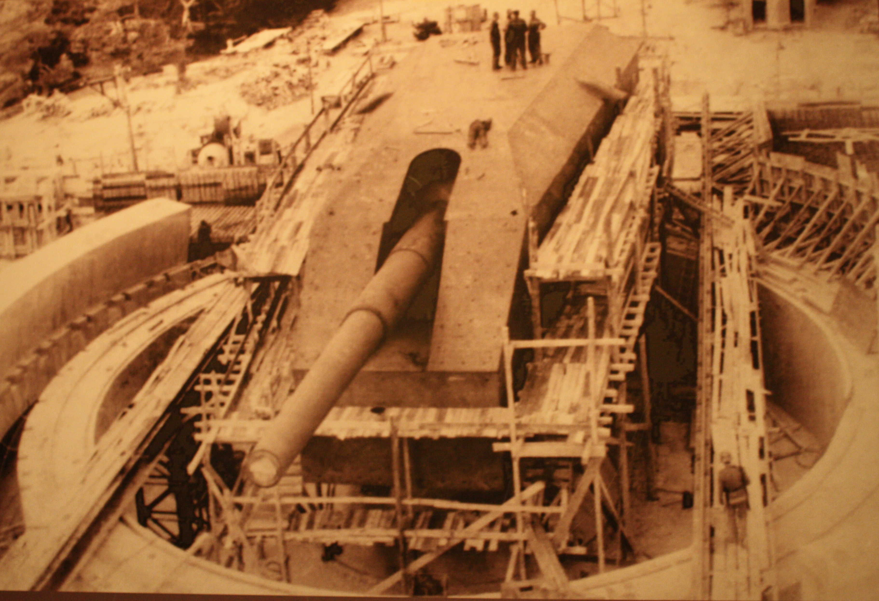 Hel, stanowisko bojowe B1 (bateria artyleryjska "Schleswig-Holstein"), 1939-1945